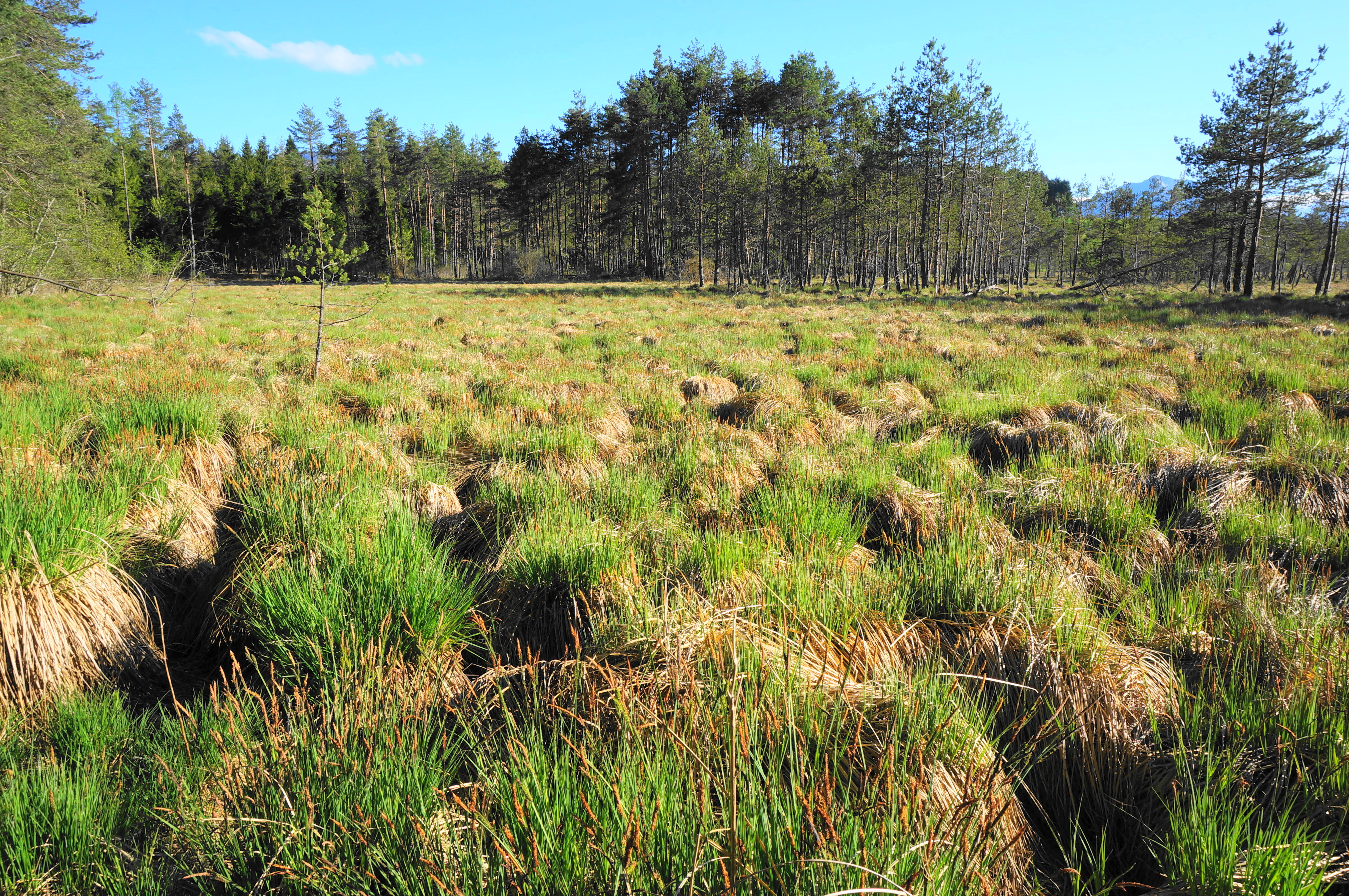 Höflein-Moor This media shows the nature reserve in Carinthia with the ID NSG.011.